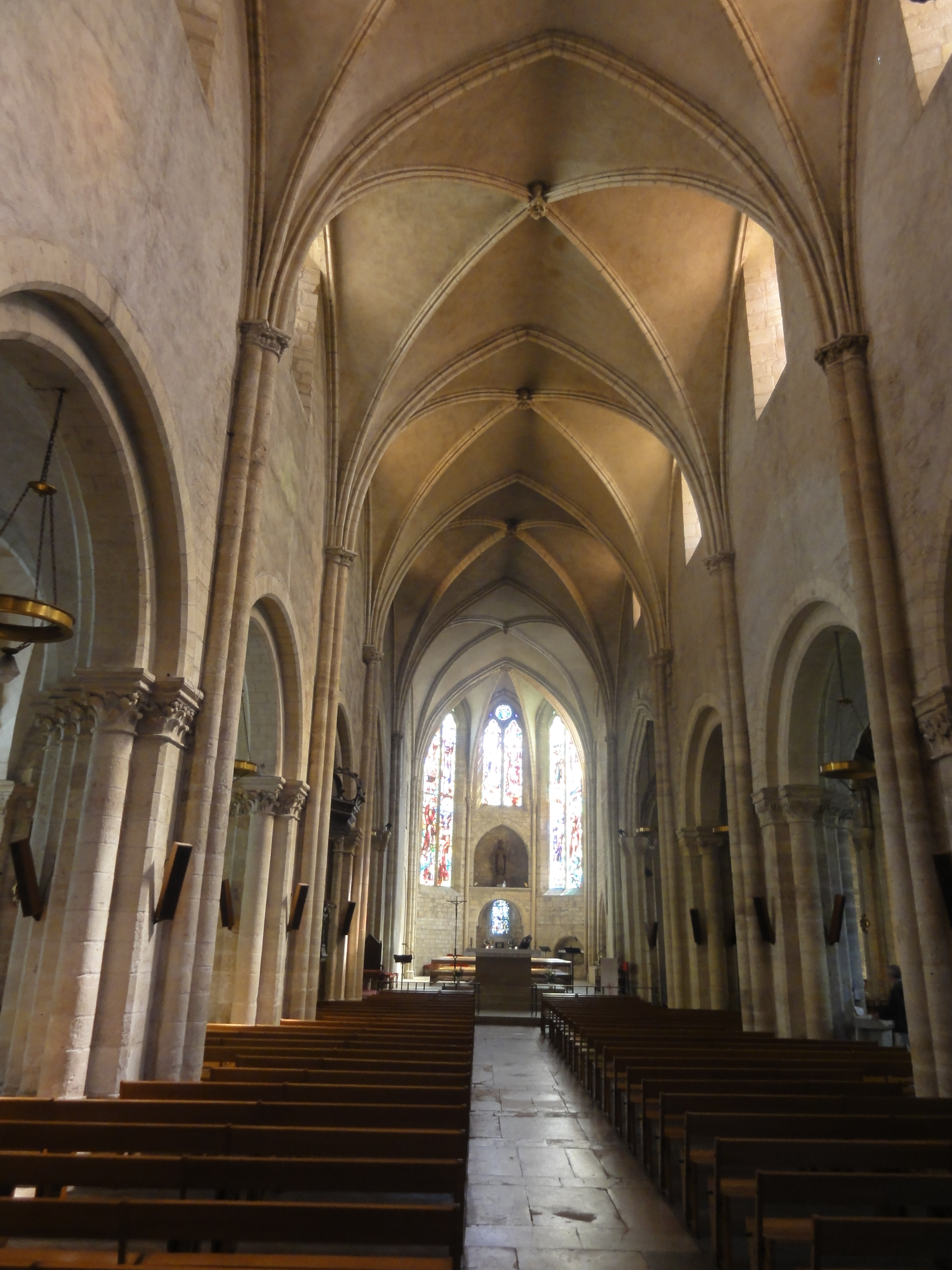 Nef, vue vers l'est.